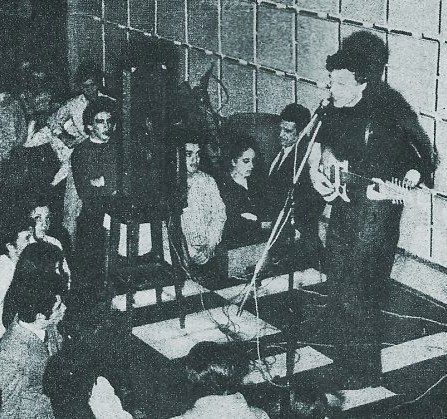 Revista "Periscopio", 1970.